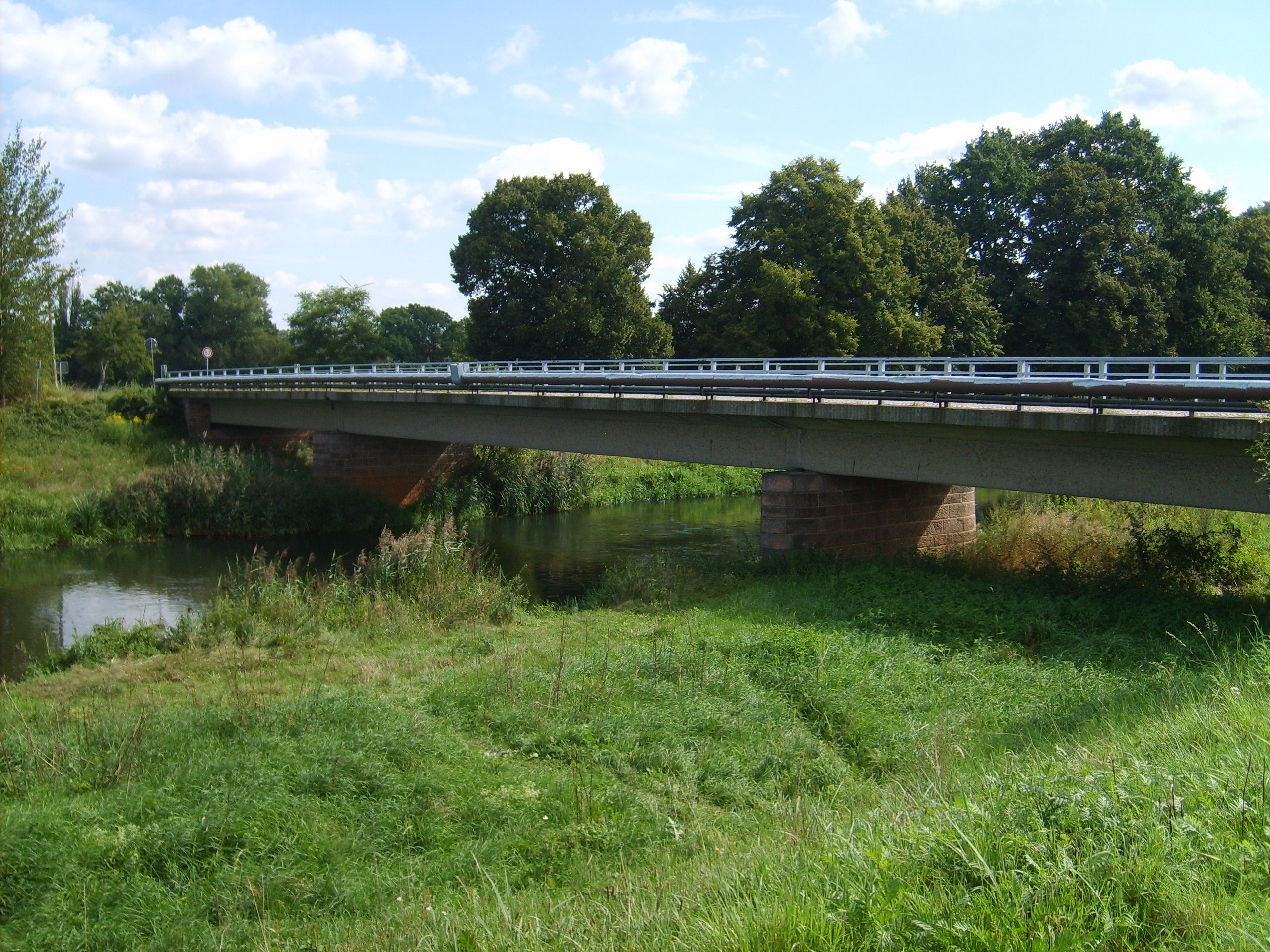 Die Brücke über die Schwarze Elster zwischen Haida und Würdenhain.